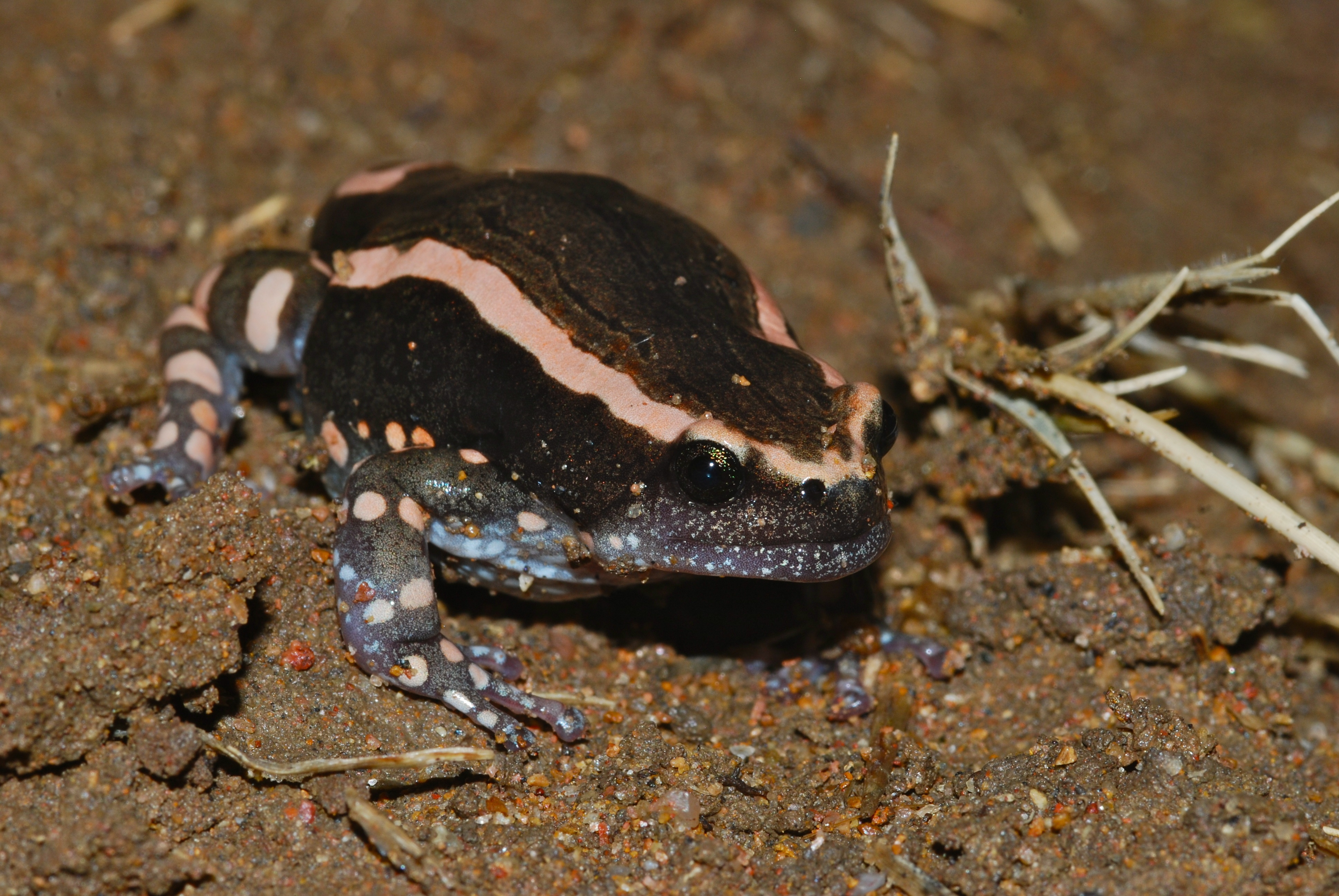 Manyane Resort Walking Trail, Pilanesberg, SOUTH AFRICA